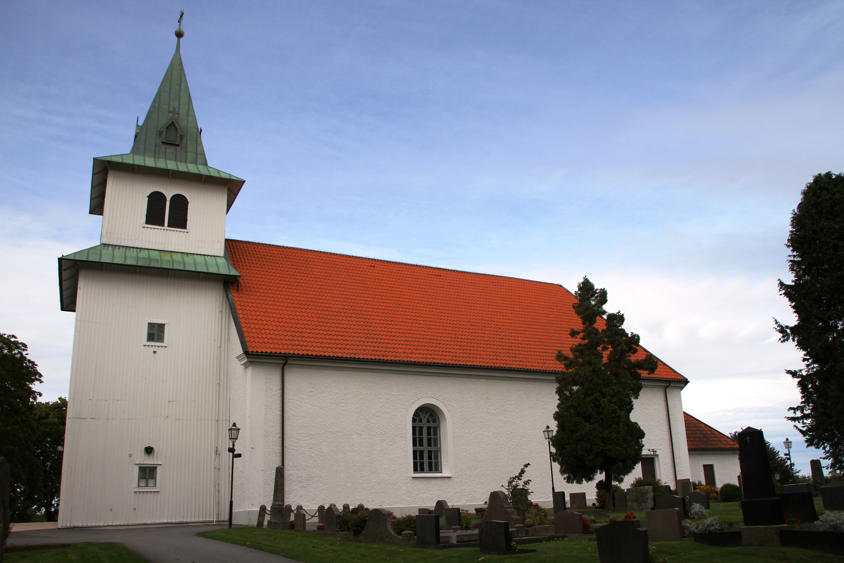 Foss kyrka i Munkedals kommun, Bohuslän. Medeltida Kung Öystein af Norge dog och vart begravd her.